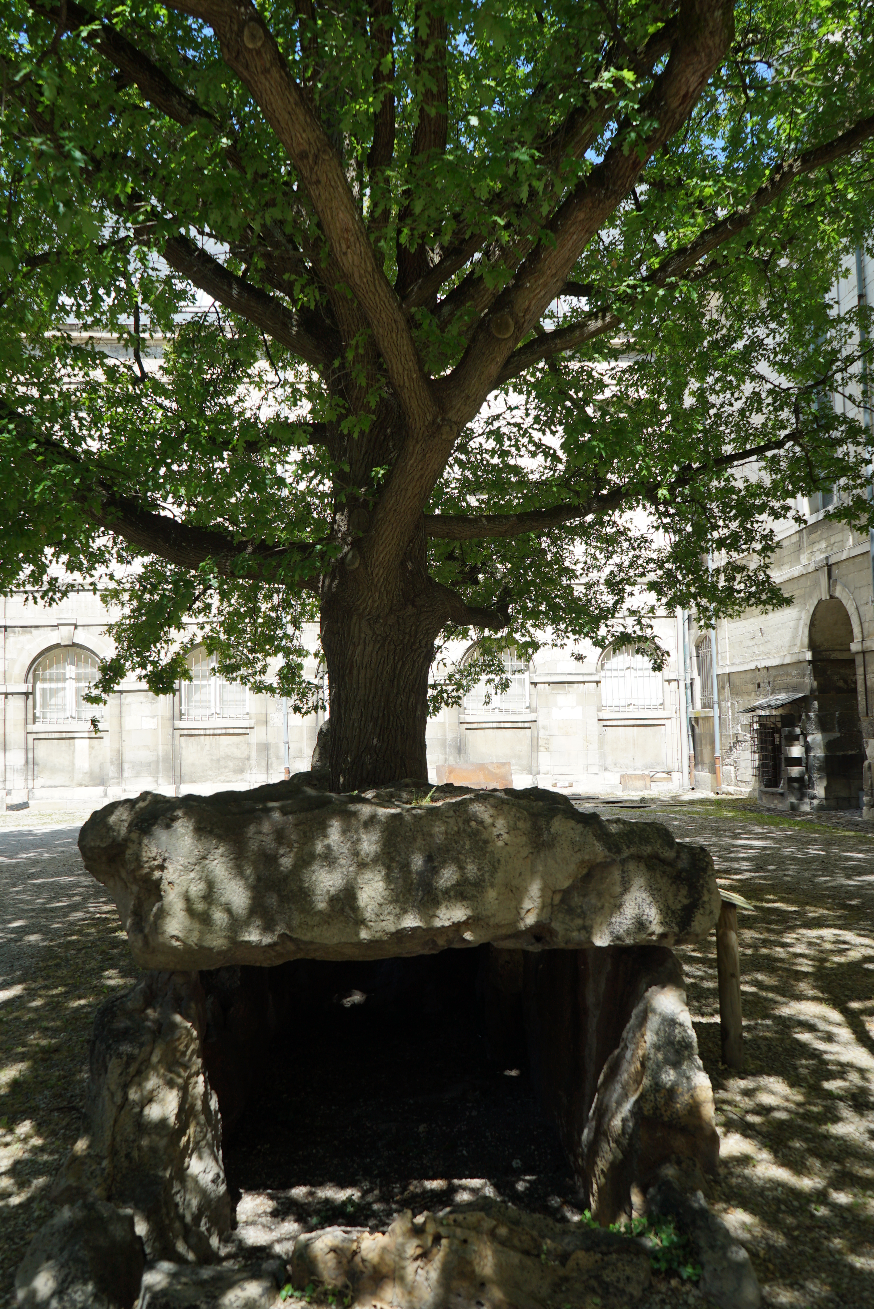 dans la cour du musée.